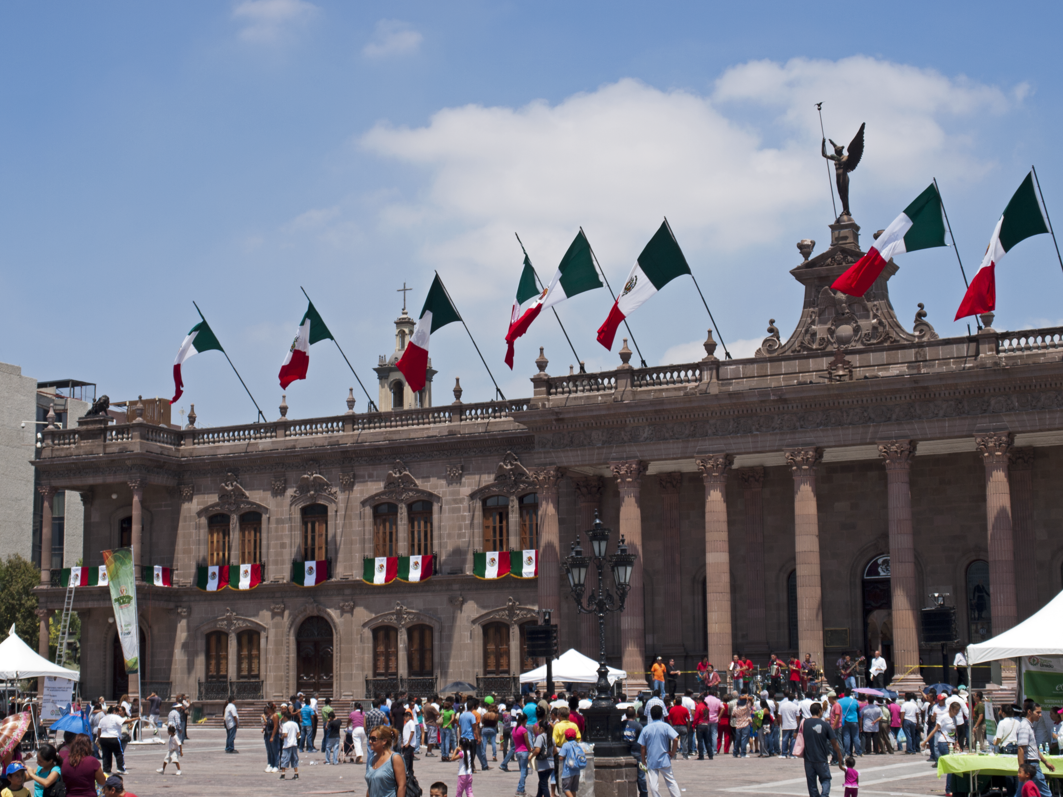 Palacio de Gobierno